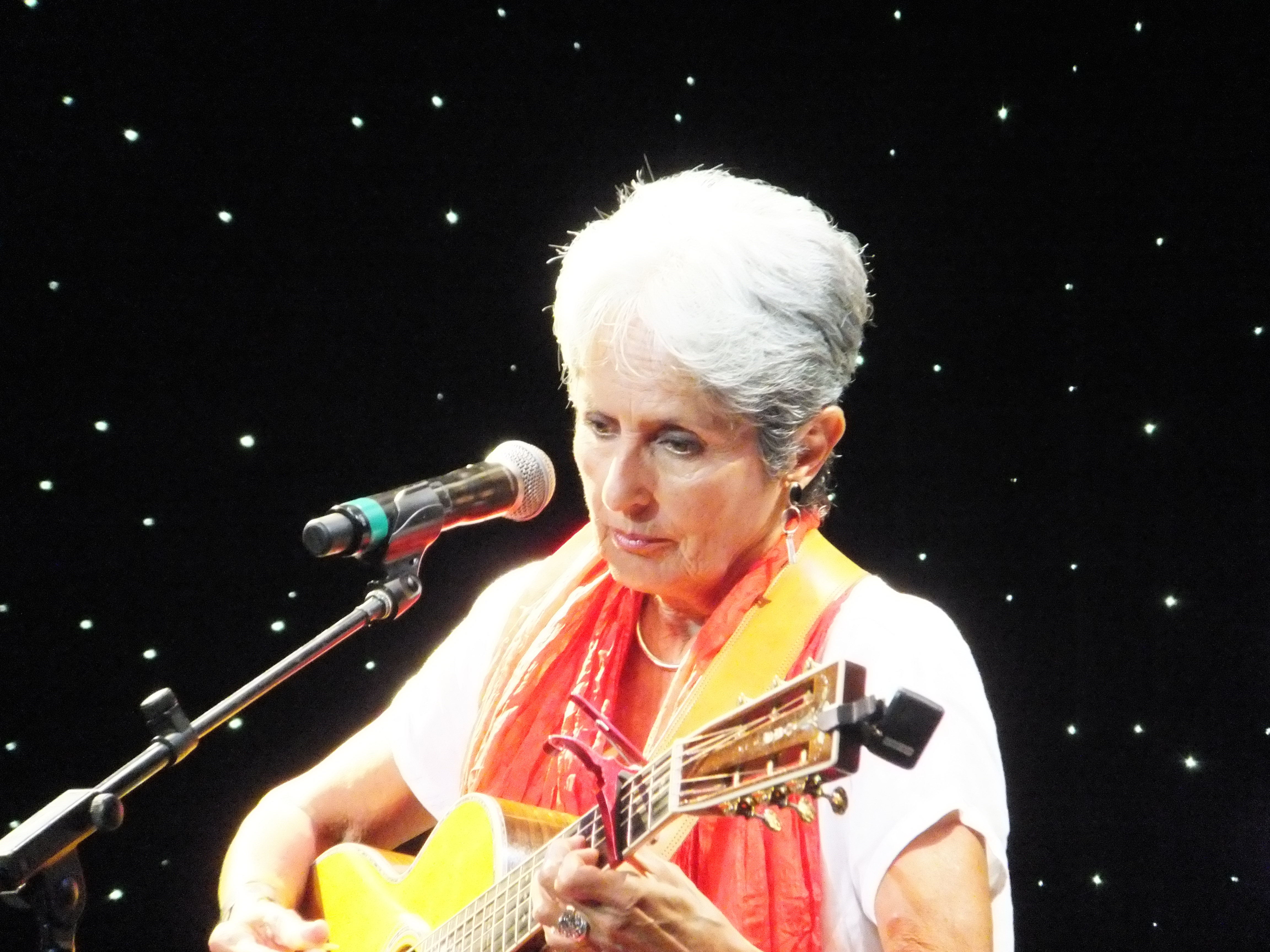 Joan Baez in 2012